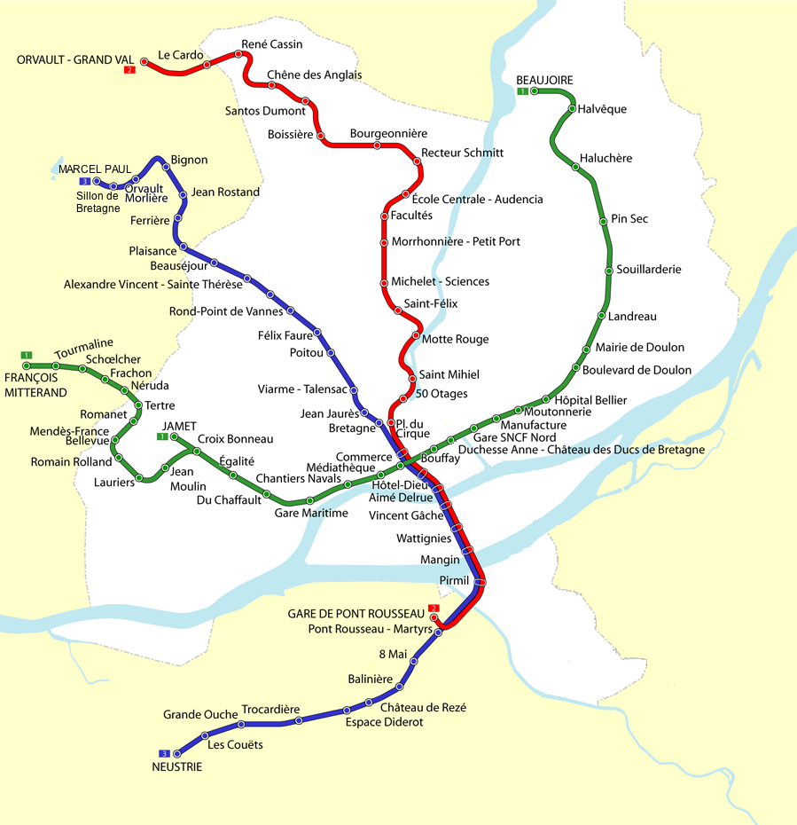 Plan du réseau de tram à Nantes en 2008